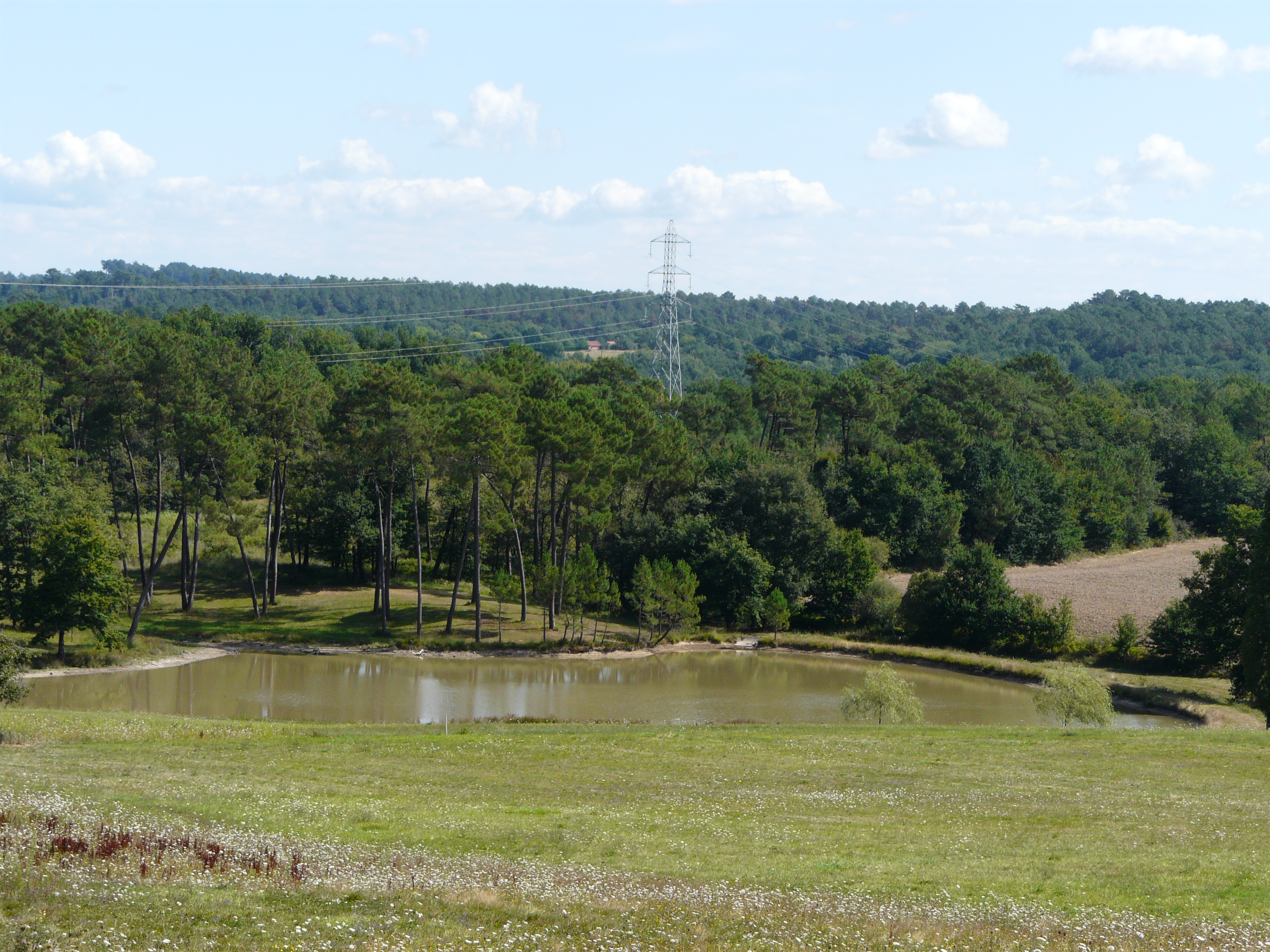 La forêt du Landais vue depuis le lieu-dit Alix, Lunas, Dordogne, France.